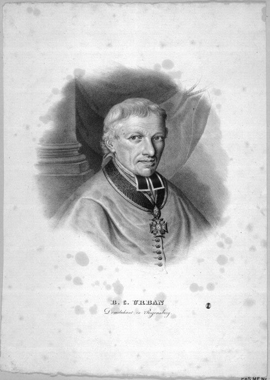 Der spätere Bischof von Bamberg Bonifaz Kaspar von Urban (1773-1858)